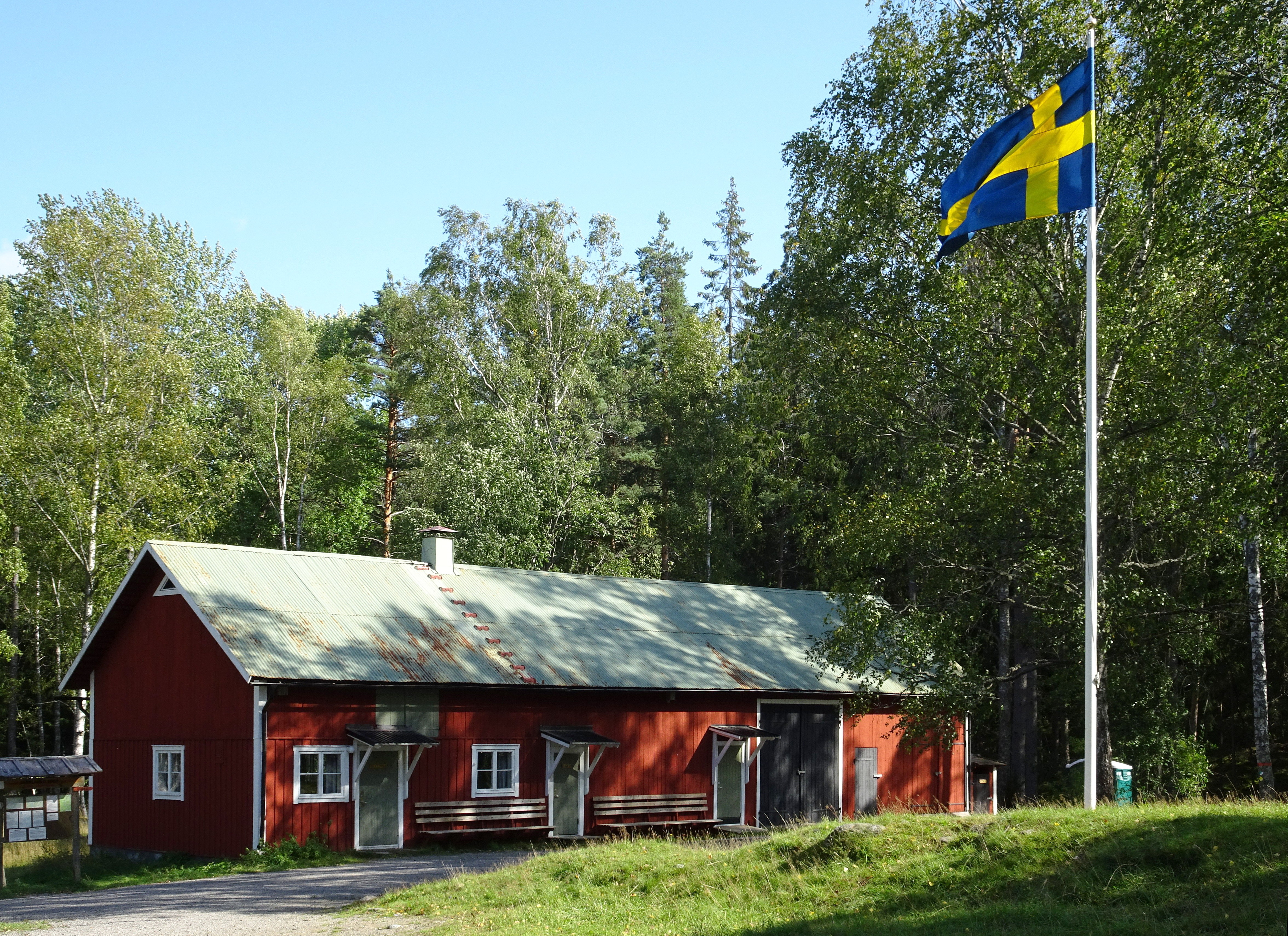 Torpet Paradiset, f.d. ladugård, nu servicebyggnad